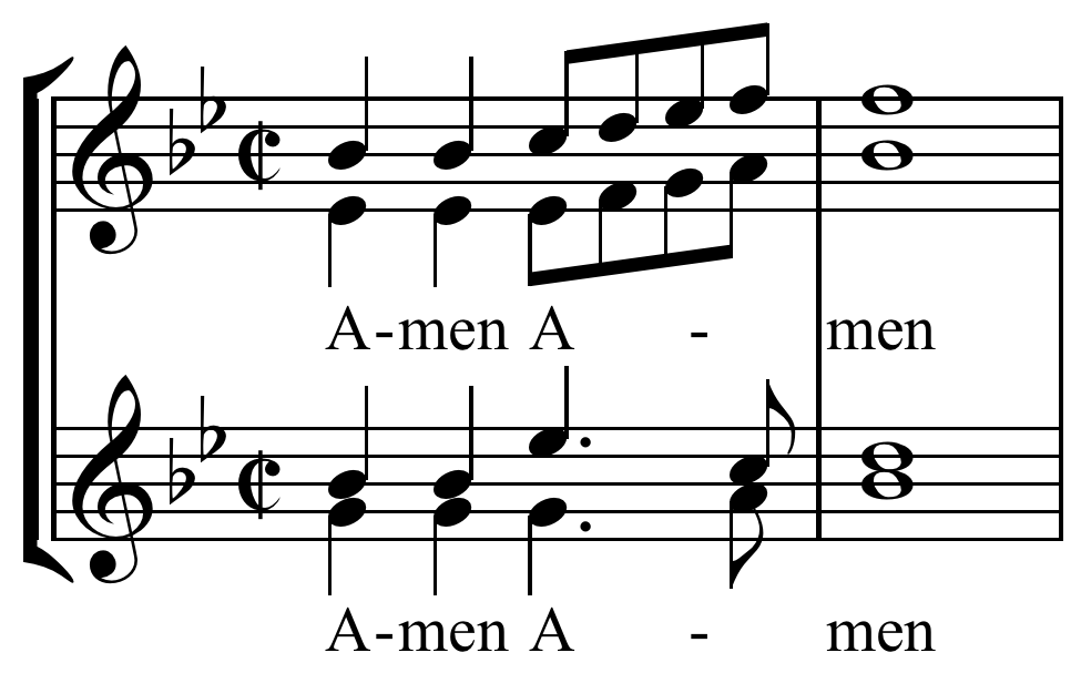 Notation des Dresdner Amen